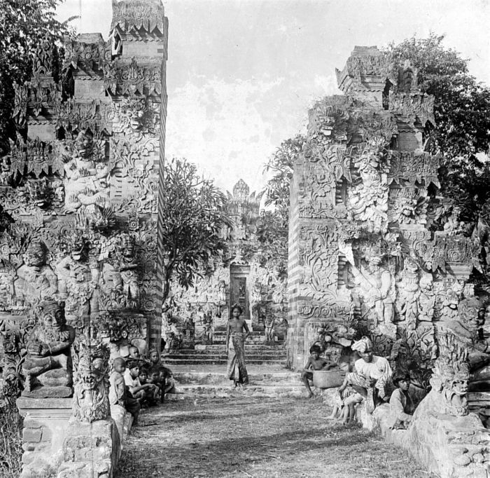 Repronegatief. Gespleten poort van de Pura Beji in Sangsit